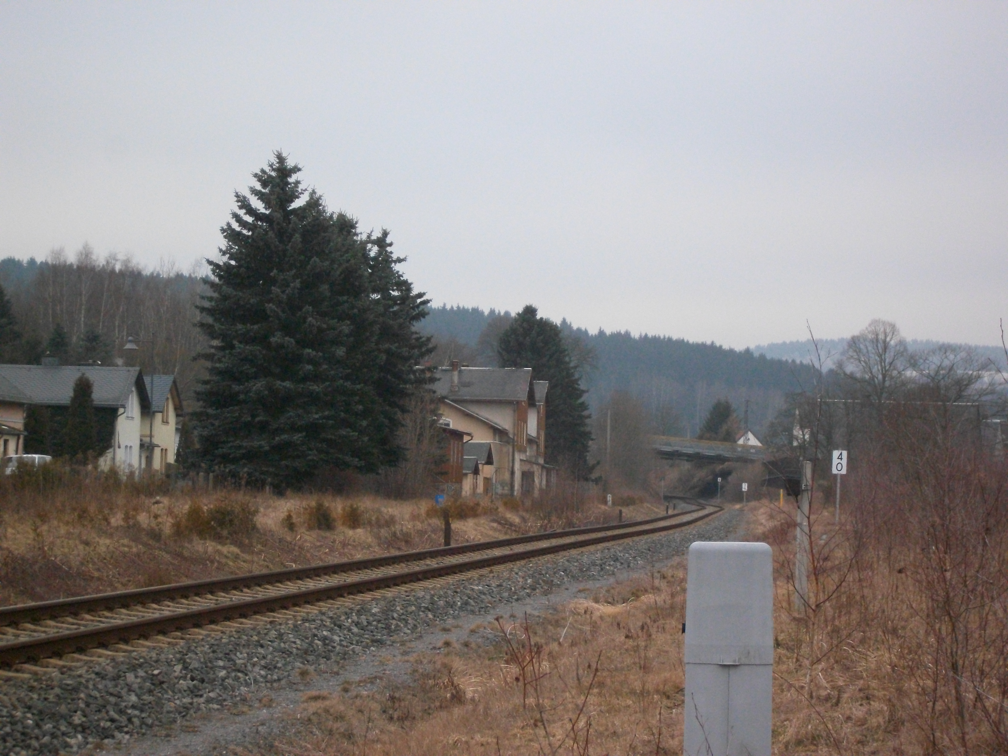 aufgelassener Bahnhof Schönfeld-Wiesa (2016)